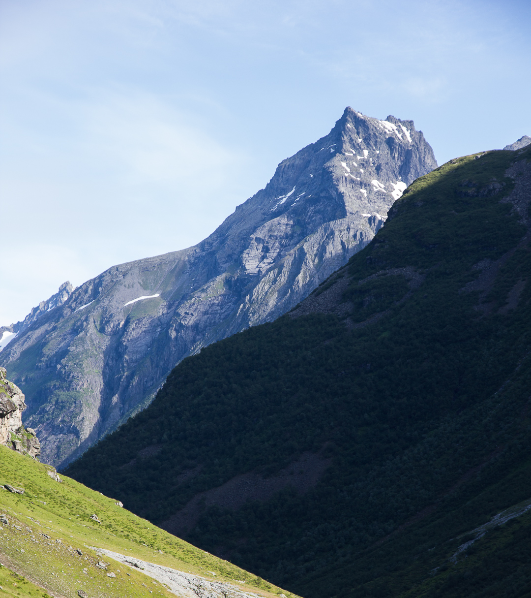 Bilde av Store Smørskredtind (Smørskredtindane) tatt i fra Uravatnet i Norangsdalen mellom Øye og Hellesylt på Sunnmøre i hjertet av Sunnmørsalpene.